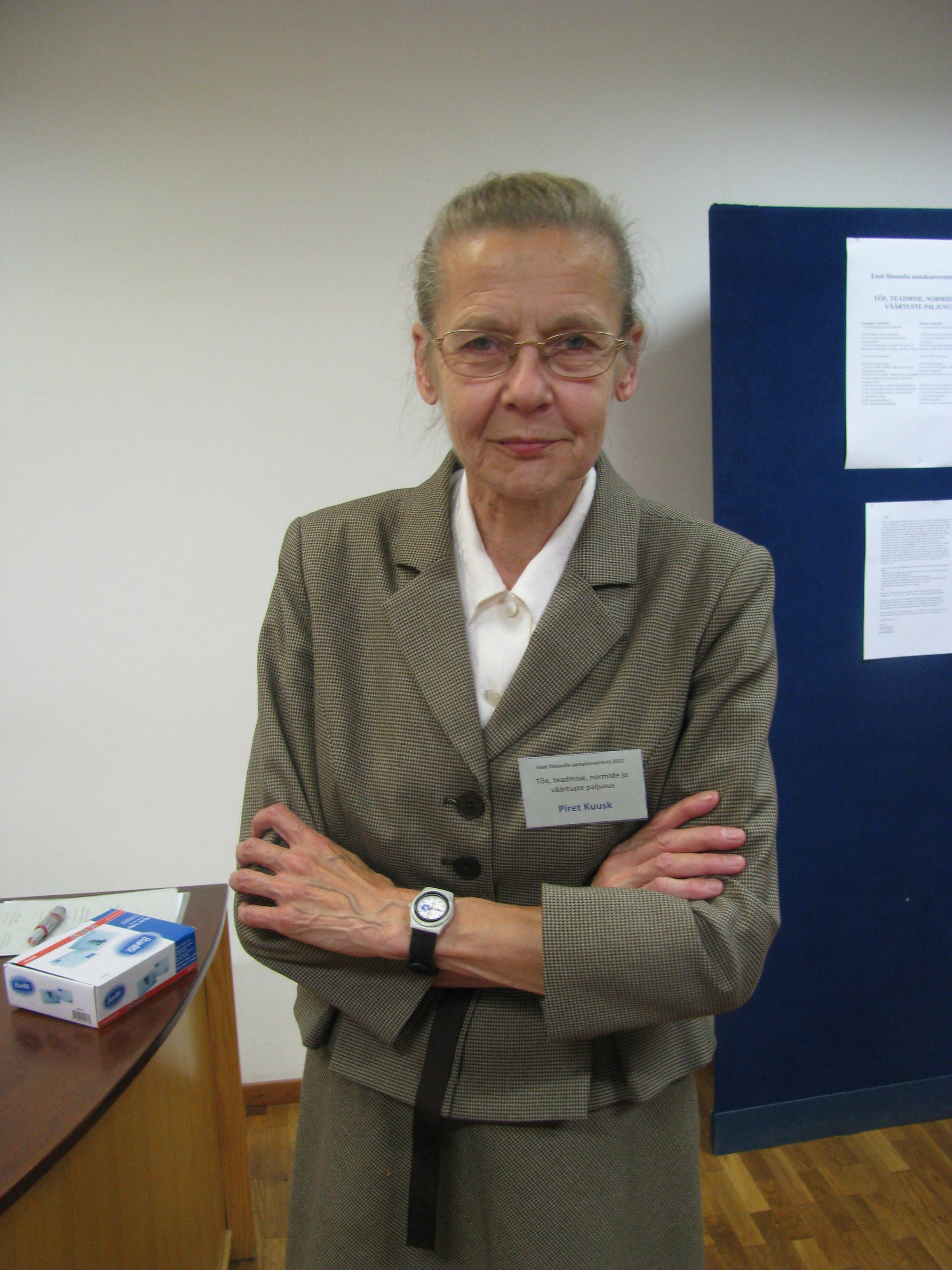 Piret Kuusk Eesti filosoofia 7. aastakonverentsil Tartus.